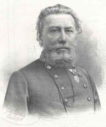 1841-1909, polityk, profesor